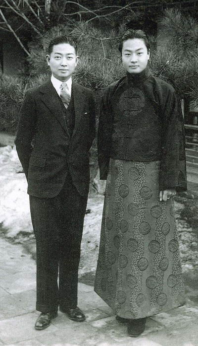 此图片为京剧大师梅兰芳、程砚秋二先生合影。虽然无法得知照片拍摄的具体时间，但因程砚秋先生于1958年去世，保守估计此摄影作品距今已逾50年，故处于公有领域